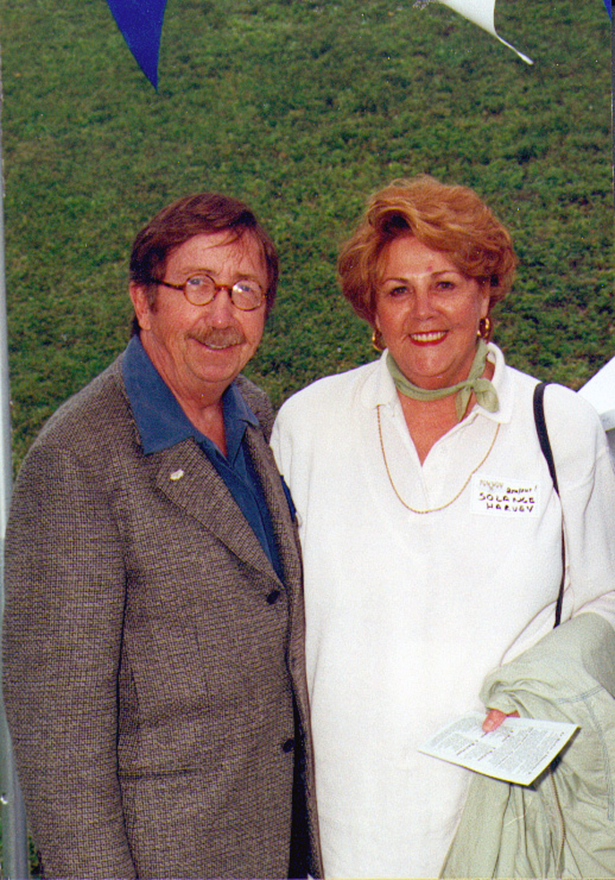 Photo prise lors des partys annuels de M. Péladeau, à sa résidence de Ste-Adèle, pour les employé-e-s du Journal de Montréal et de Québec.